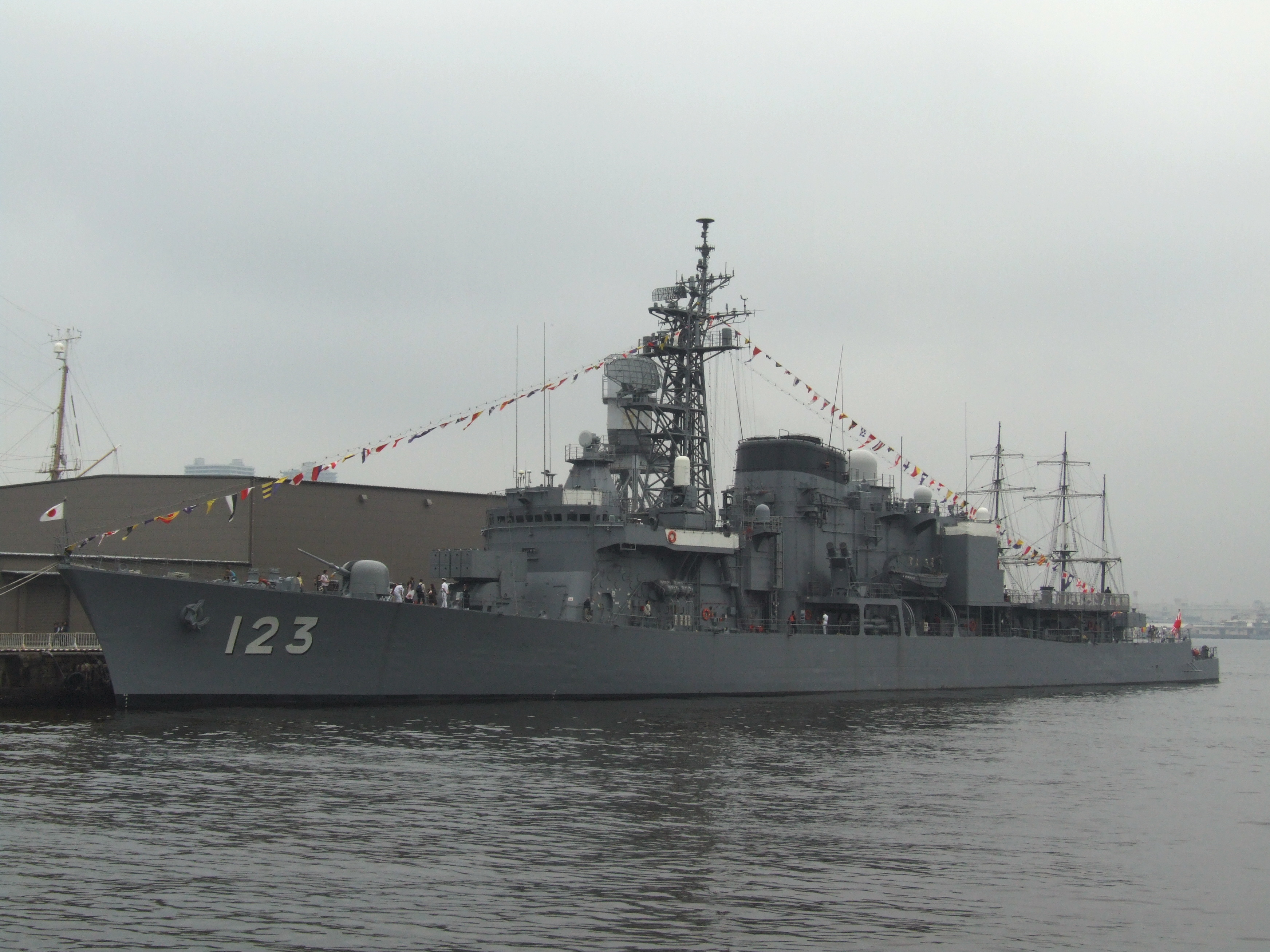 護衛艦しらゆき。横浜港開港150年のイベントでの艦内公開時の撮影。